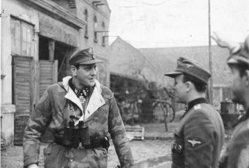 SS-Obersturmbannführer Otto Skorzeny an der Oder ADN-Zentralbild /Archiv Februar 1945 Ritterkreuzträger SS-Obersturmbannführer Skorzeny, der Mussolini zur Flucht verhalf, bei einer Lagebesprechung mit SS-Führern einer SS-Fallschirmjäger-Einheit. (an der Oder 1945) [Scherl Bilderdienst] Abgebildete Personen: Skorzeny, Otto: SS-Hauptsturmführer, Ritterkreuz (RK), Waffen-SS, Deutschland (GND 118614886)